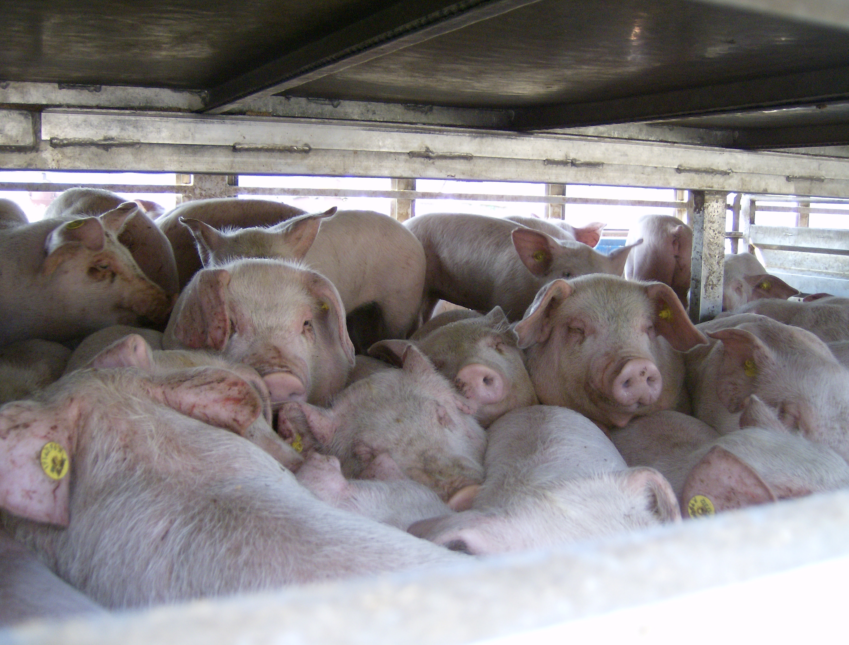 транспорт на животни